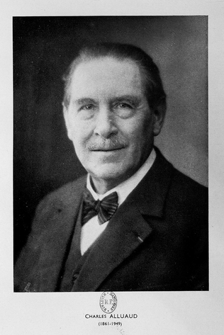 Portrait de Charles Alluaud